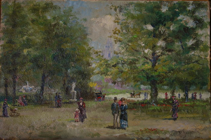 Oleo sobre carton